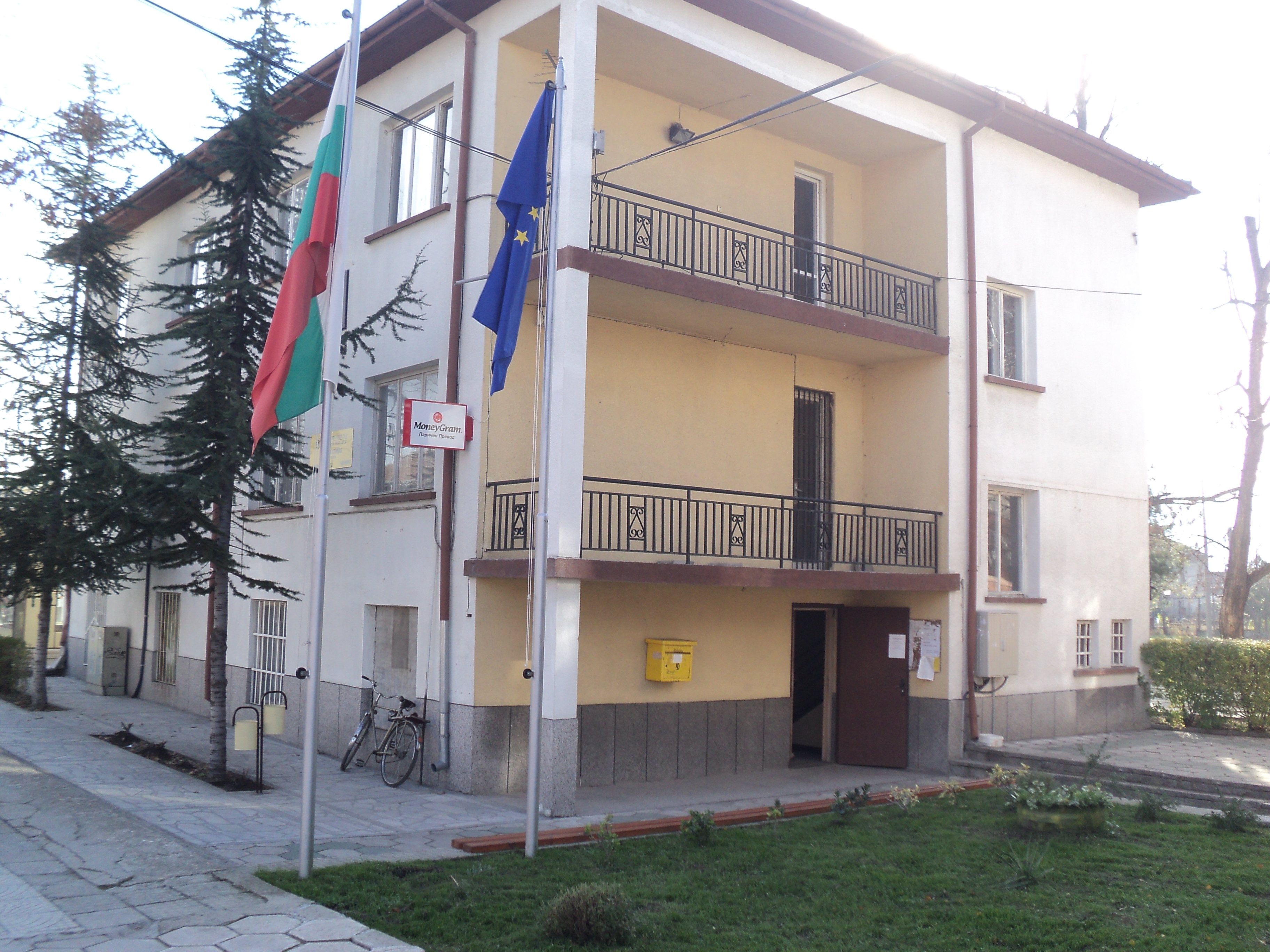 Кметство на село Крумово(община Пловдив)